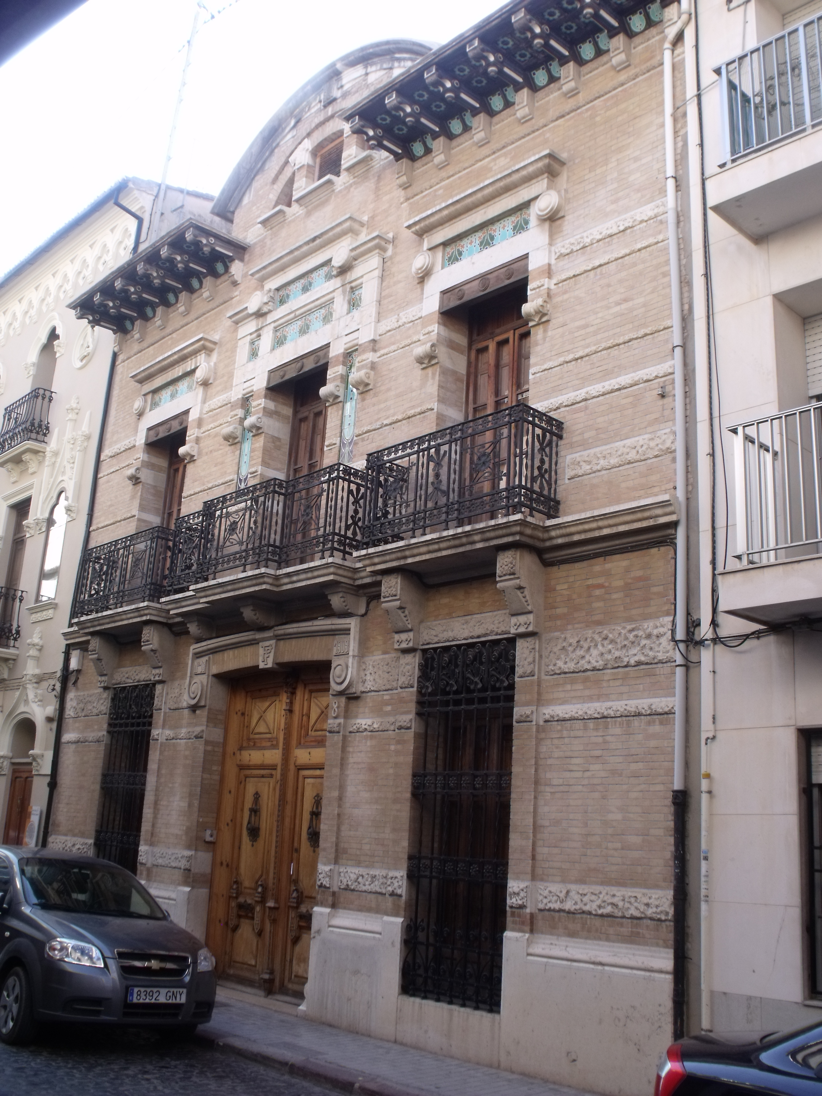 Números 8/ 10 de la calle San José. Casa de pasqual Fos o de Messeguer, construida en 1917 bajo la dirección del arquitecto Pasqual Bonaventura Ferrando Castells.